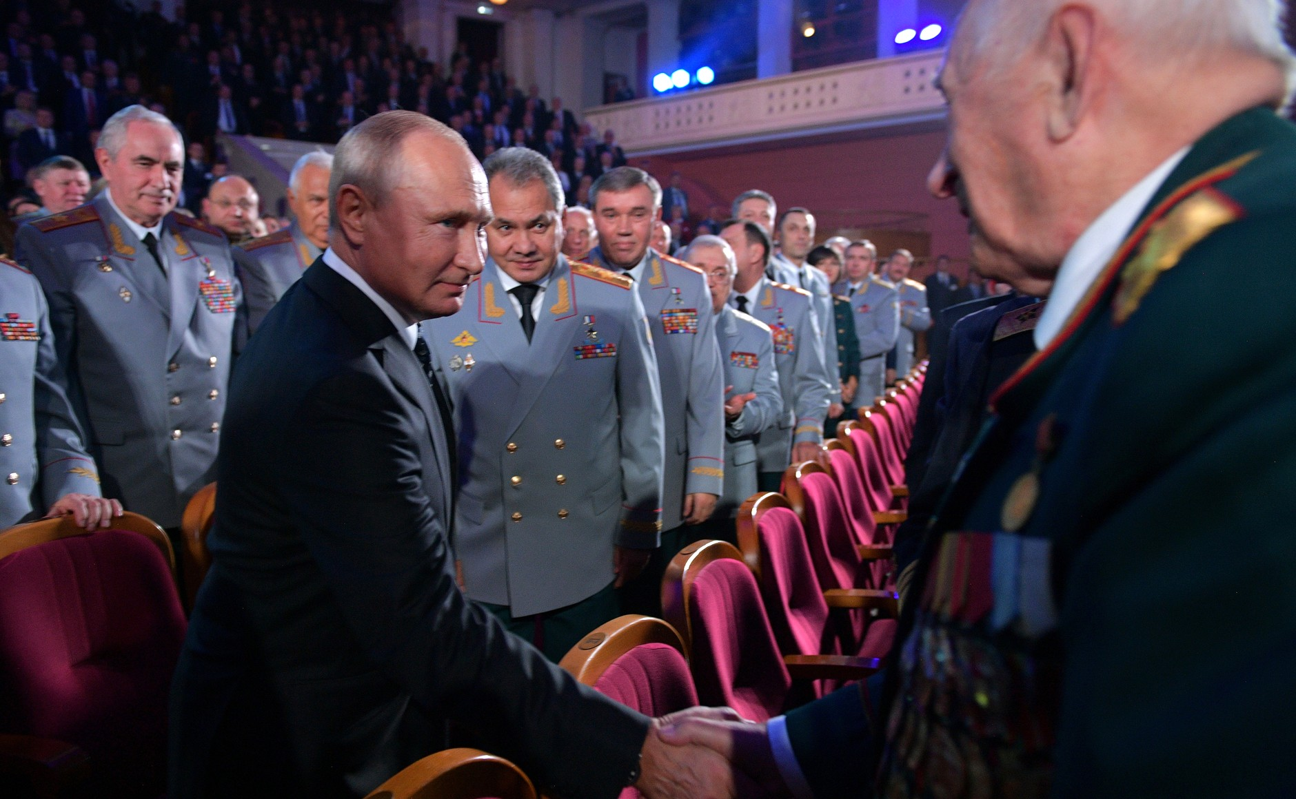 Президент Российской Федерации – Верховный Главнокомандующий Вооруженными Силами Российской Федерации Владимир Путин на торжественном мероприятии, посвящённом 100-летию образования Главного управления Генерального штаба Вооружённых Сил России